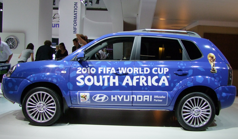 Hyundai Tucson auf der IAA 2009, Special-Edition zur FIFA Fußball-Weltmeisterschaft 2010 in Südafrika